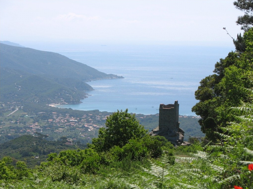 Blick vom Turm San Giovanni nach Marina di Campo, Elba